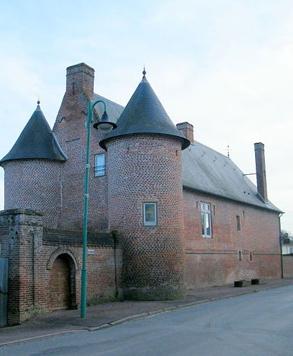 Le château de Miannay, Somme.